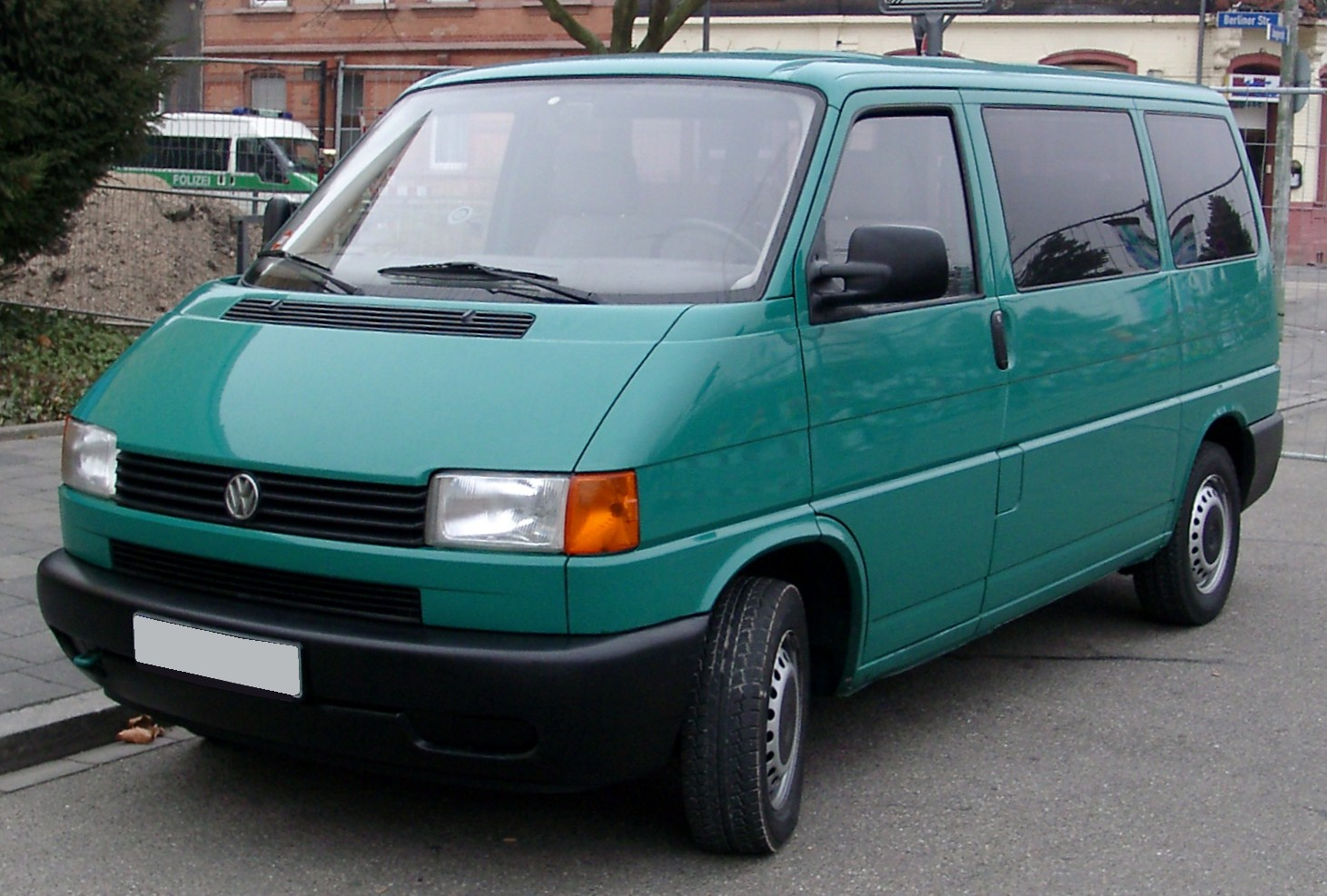 VW Bus (T4)